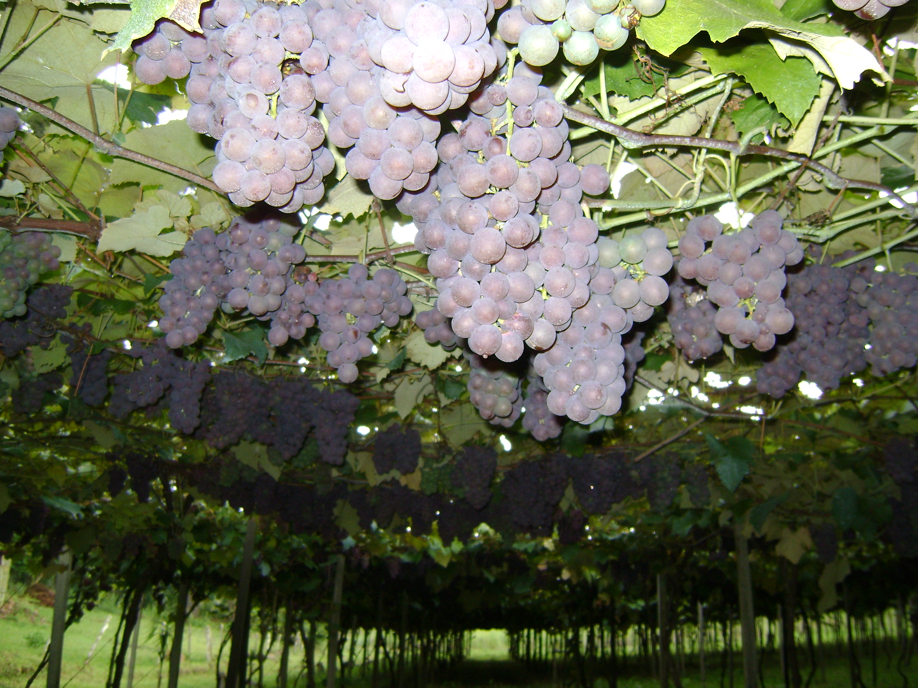 BELAS UVAS NO INTERIOR DE CAXIAS DO SUL